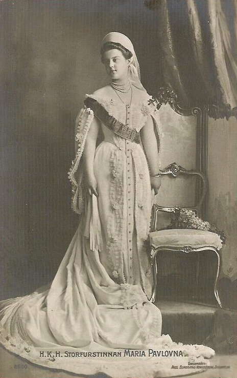 Marija Pavlovna Romanova